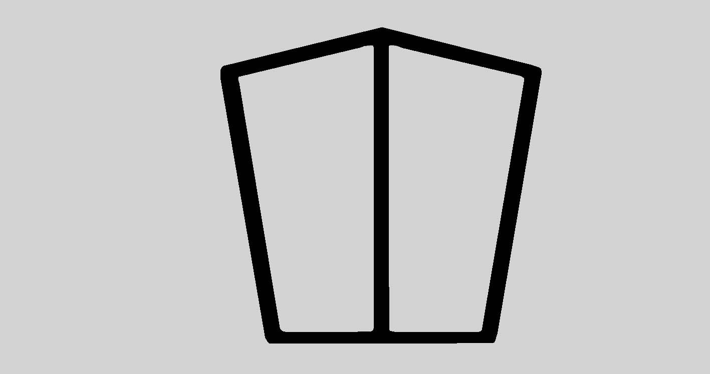 Typologie der podomorphen Petrosomatoglyphen auf Lanzarote nach Hans-Joachim Ulbrich